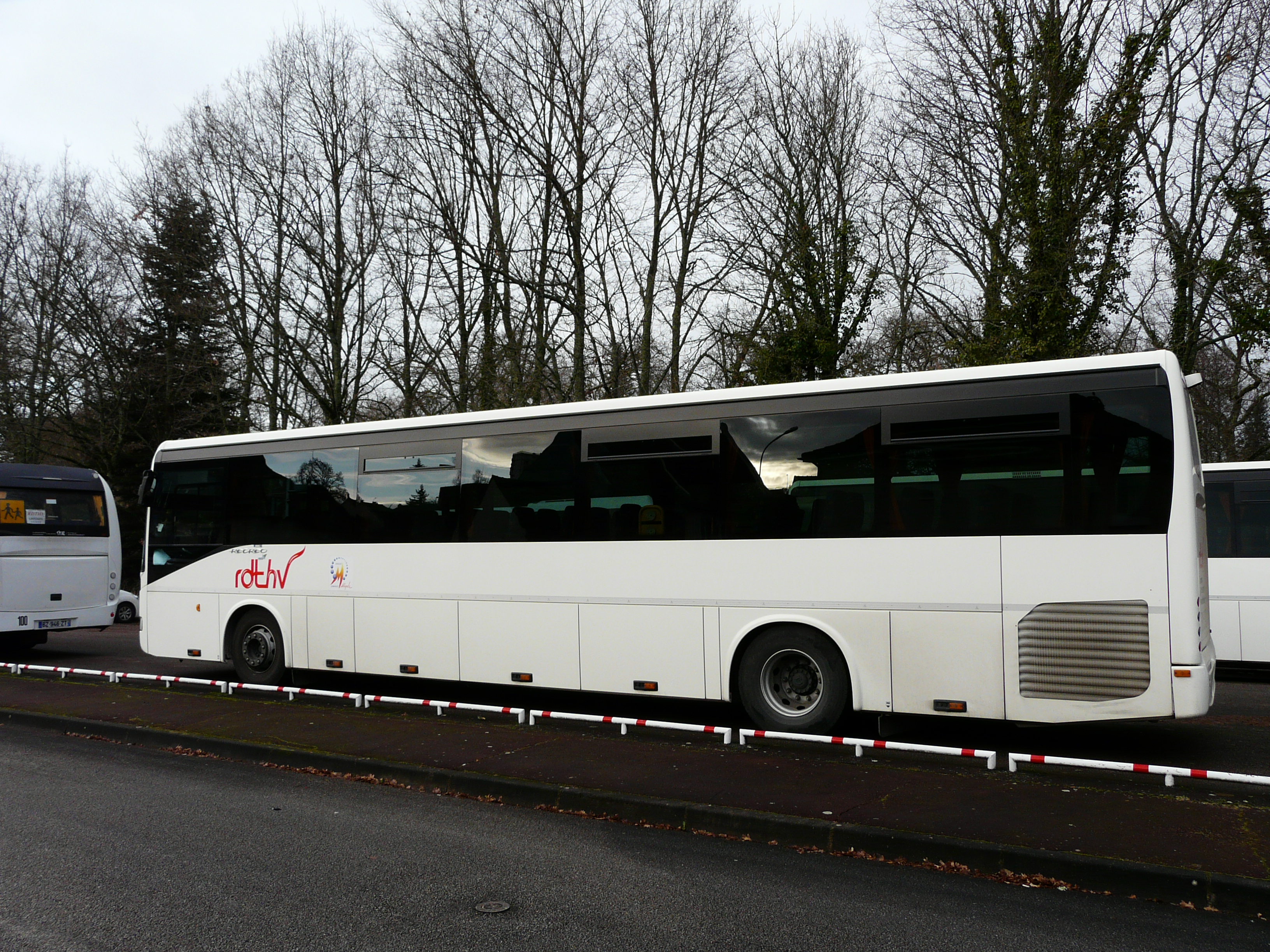 Un Irisbus Récréo de la RDTHV à Limoges, Haute-Vienne, France.